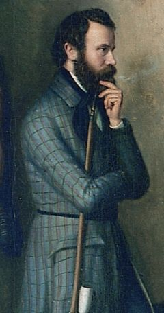 Johann Velten, "Eine Gefängnisscene" (Detail), 1849, Öl auf Leinwand, 78 x 93 cm, Stadtmuseum Simeonstift Trier.